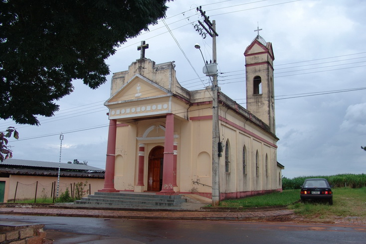 Imagem de Vitoriana, distrito do município de Botucatu, estado de São Paulo, Brasil.